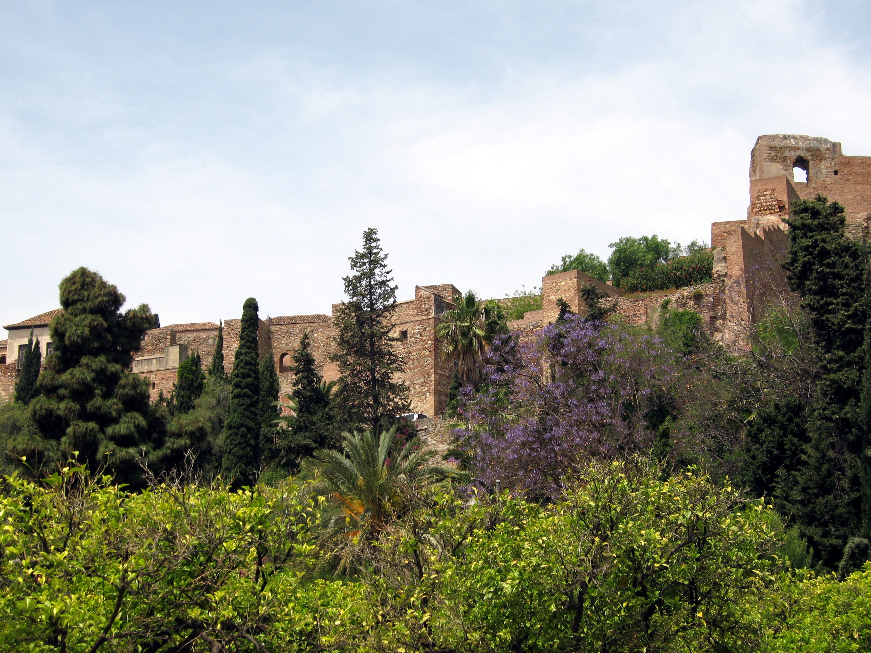 Alcazaba in Málaga, Andalusien, Spanien